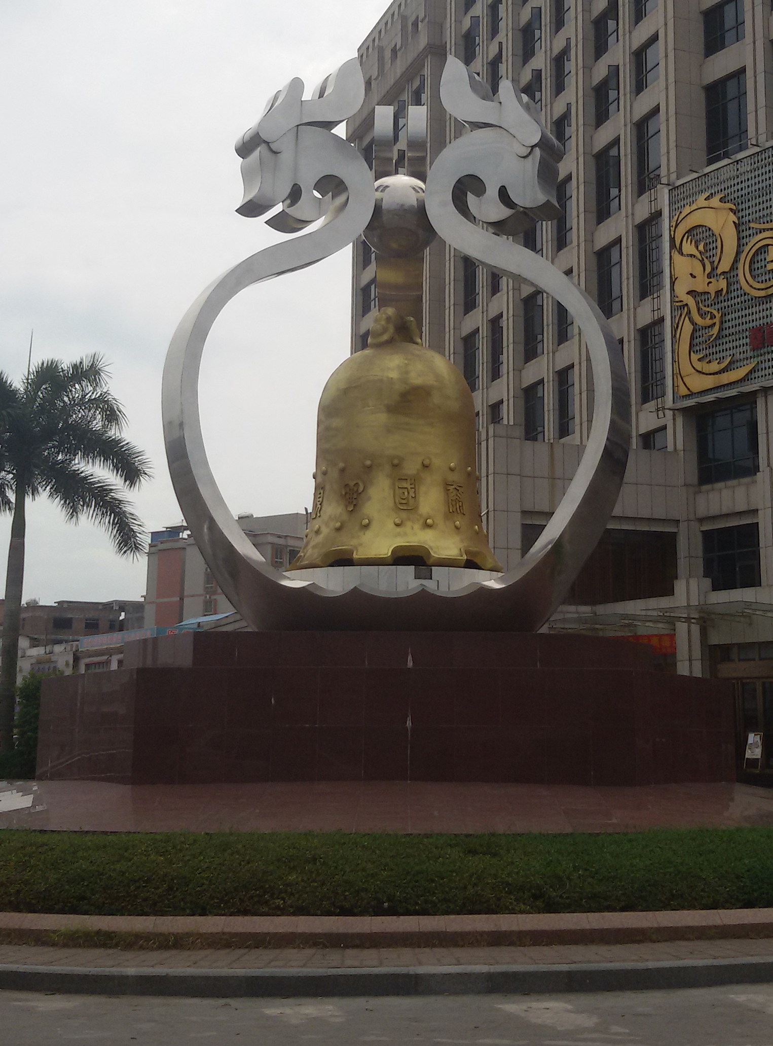 粵語: 鐘落潭地區出面嘅大鐘地標